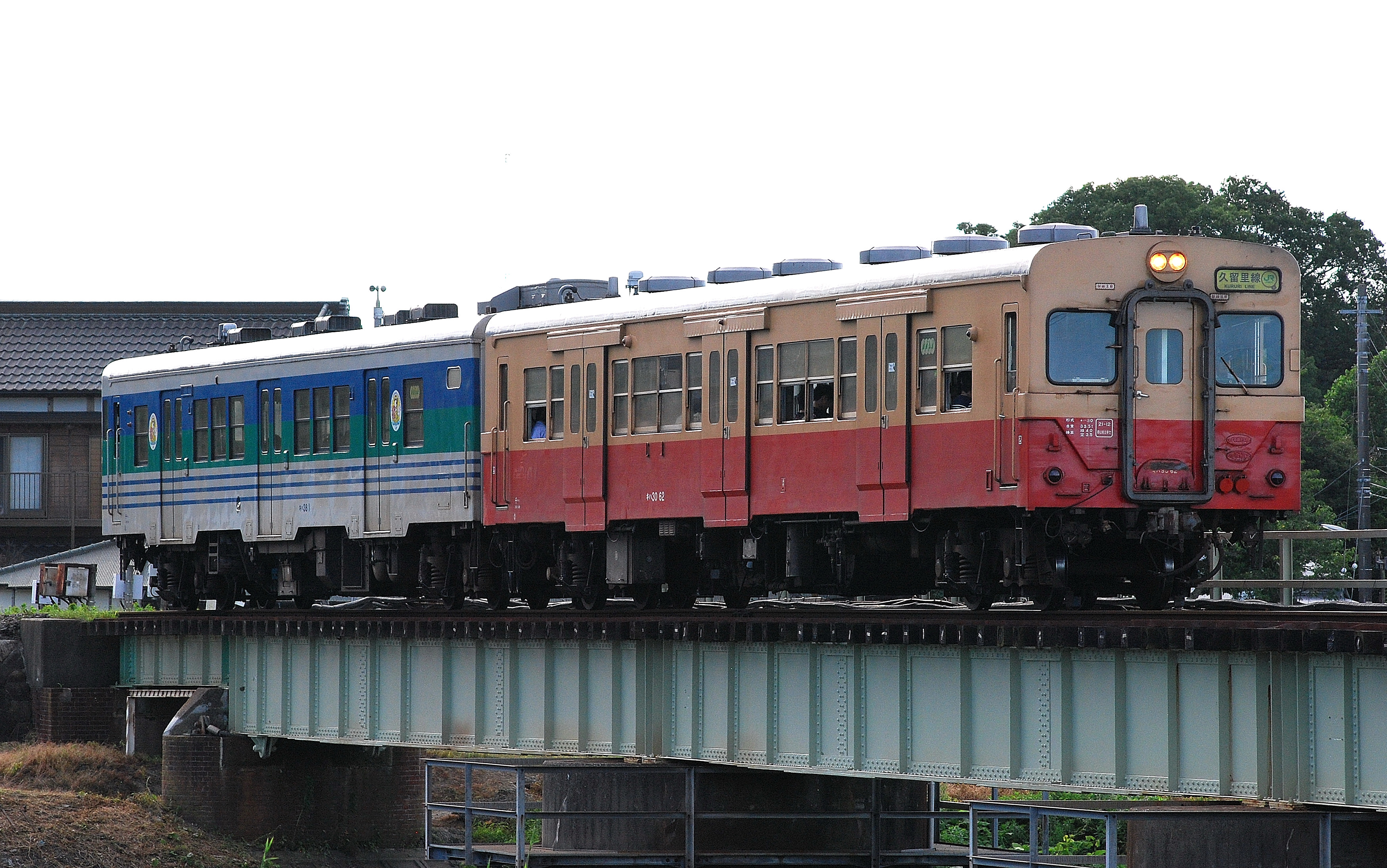 久留里線を走行する、登場時の国鉄一般色に復元されたキハ30 62と久留里線色のキハ38 1（公道から撮影）